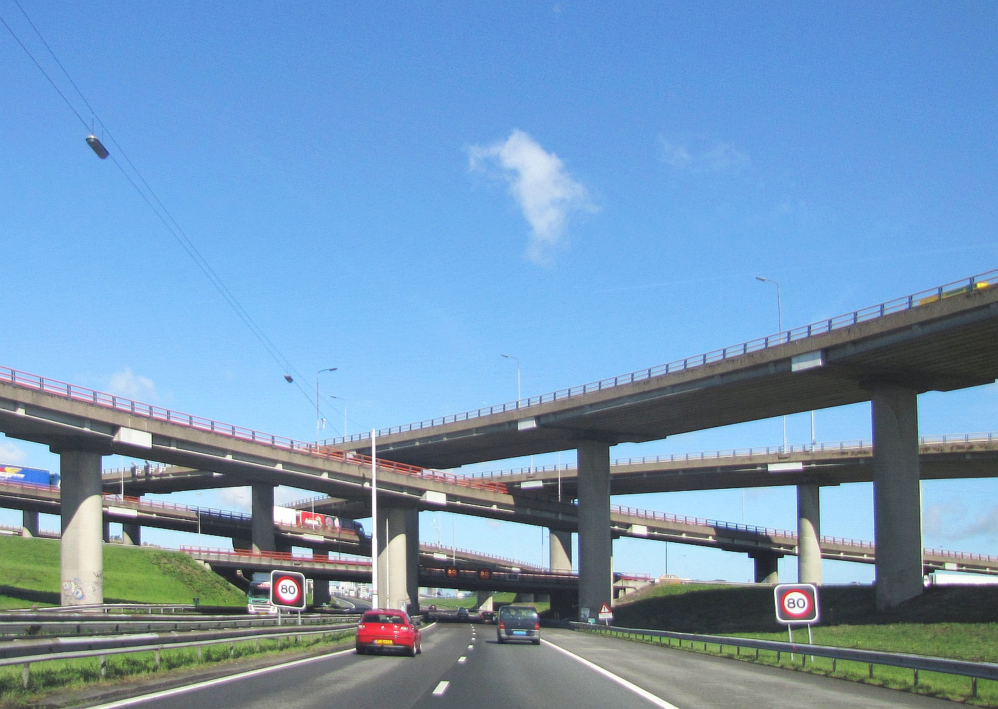 Knooppunt Prins Clausplein - ein Autobahnkreuz mit fünf Brücken für (Rijksweg) A4 und (Autosnelweg) A12 hier von (Ost) Zoetermeer nach (West) Den Haag Niederlande Foto Wolfgang Pehlemann IMG_1178